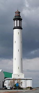 Phare de Dunkerque (Nord)